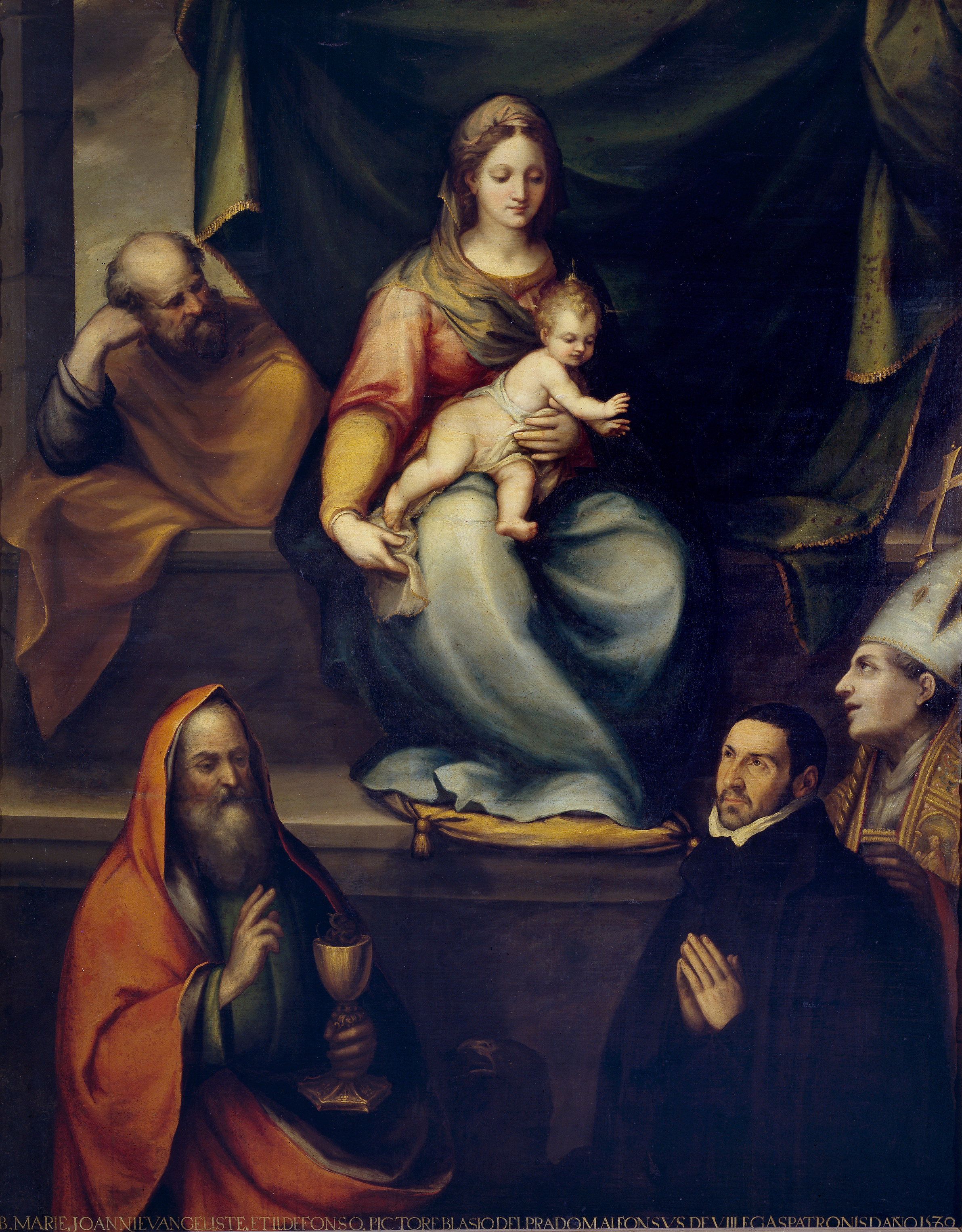 La obra representa a los tres miembros de la Sagrada Familia junto a San Ildefonso, San Juan Evangelista y el eclesiástico y escritor Alonso de Villegas.